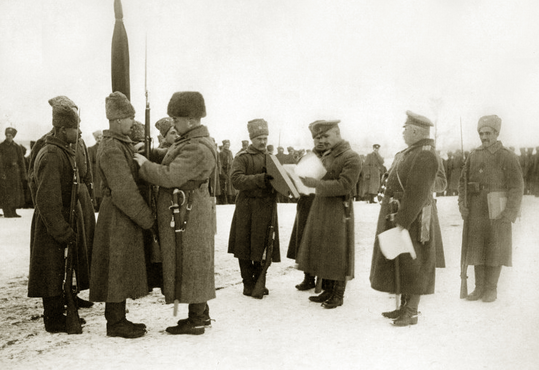 Начальник 70-й пехотной дивизии генерал-лейтенант барон А. П. фон Будберг вручает Георгиевские кресты солдатам 280-го пехотного Сурского полка. 6 декабря 1916 года. Приказ зачитывает (предположительно) командир полка полковник К. А. Присовский.